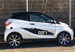 Aixam coupé gtI voiturette